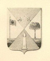 Герб Полтавского пикинерного полка русской армии, 1776-1784.